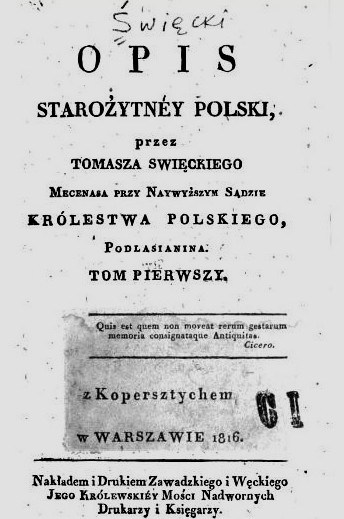 Publikacja ta ukazała się w 1816 roku, składa się z dwóch tomów.